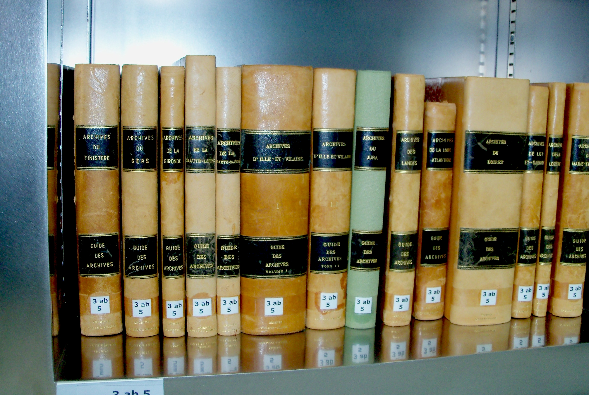 Partie de la collection des guides des Archives départementales de la salle de lecture des Archives départementales d'Ille-et-Vilaine.